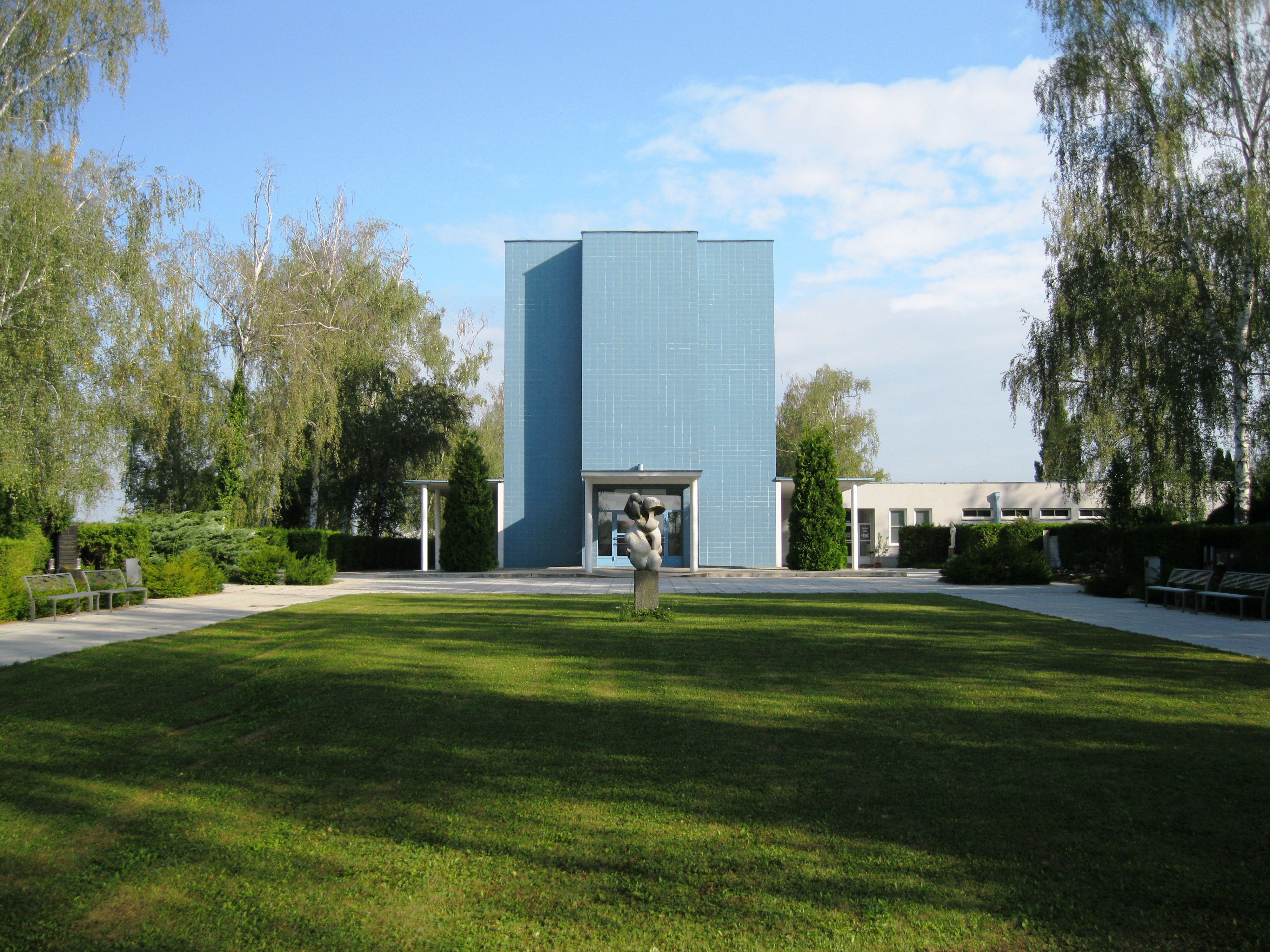 Jiná funerální stavba - soubor hřbitovní architektury, hrobky, hroby (Olomouc), ústřední hřbitov, tř. Míru, Olomouc